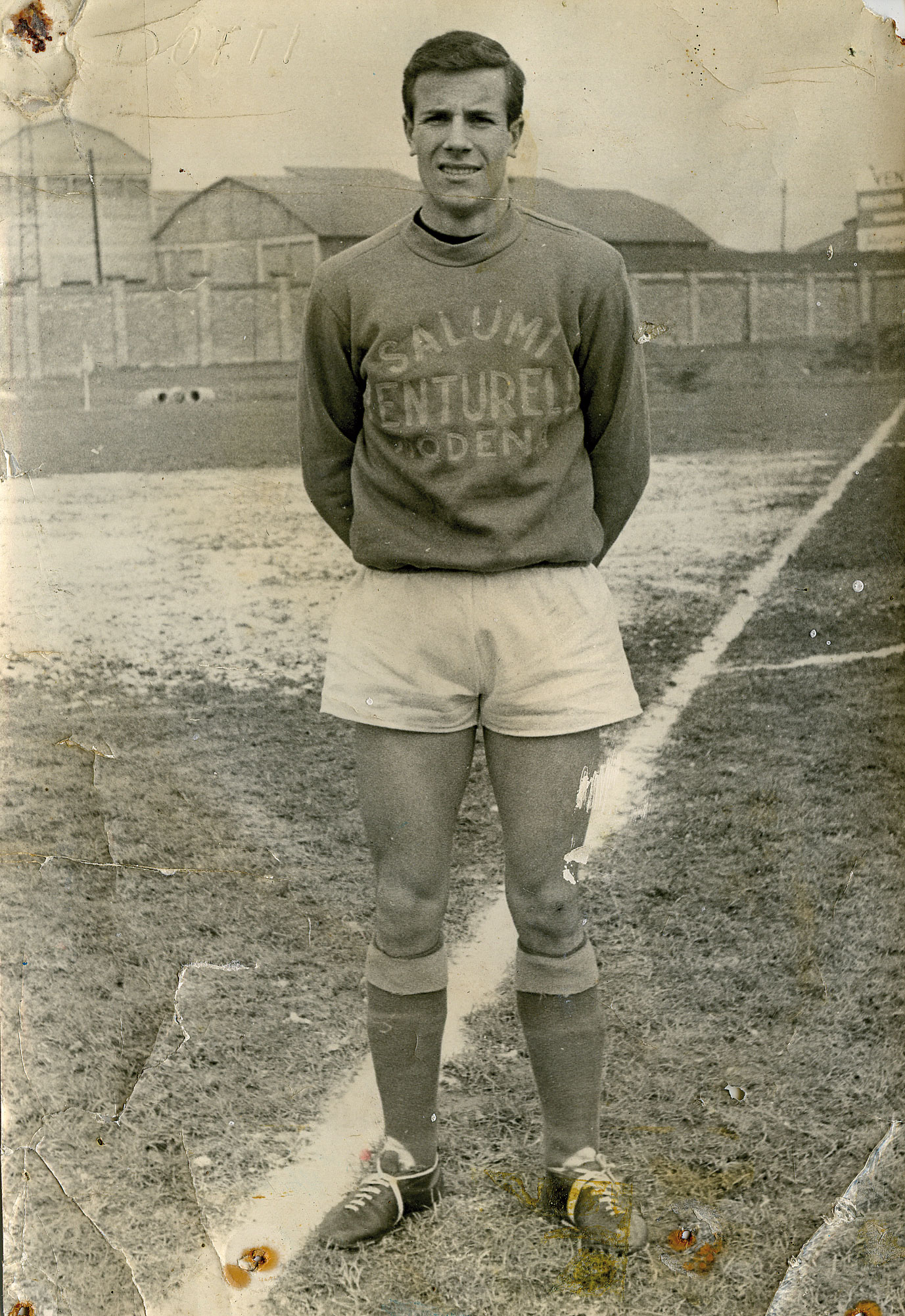 Piero Dotti, giocatore di calcio della US Mirandolese tra il 1957 e il 1959